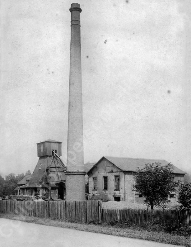 Le puits Sainte-Pauline des houillères de Ronchamp, peu de temps avant sa fermeture.